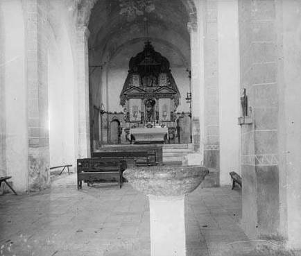 Imatge